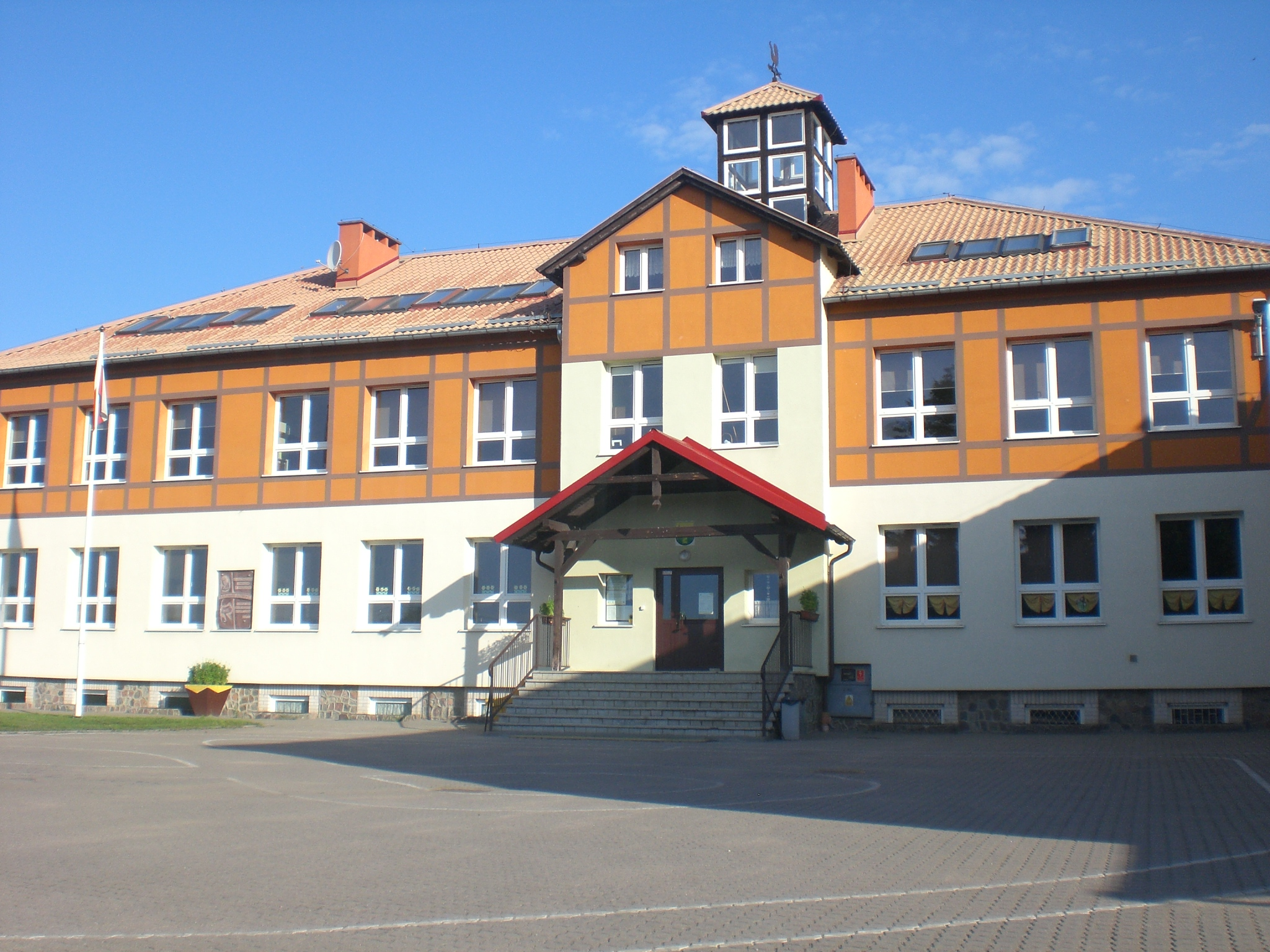 Borzechowo